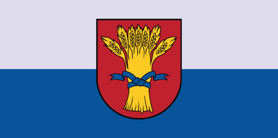 Rūjienas novada karogs